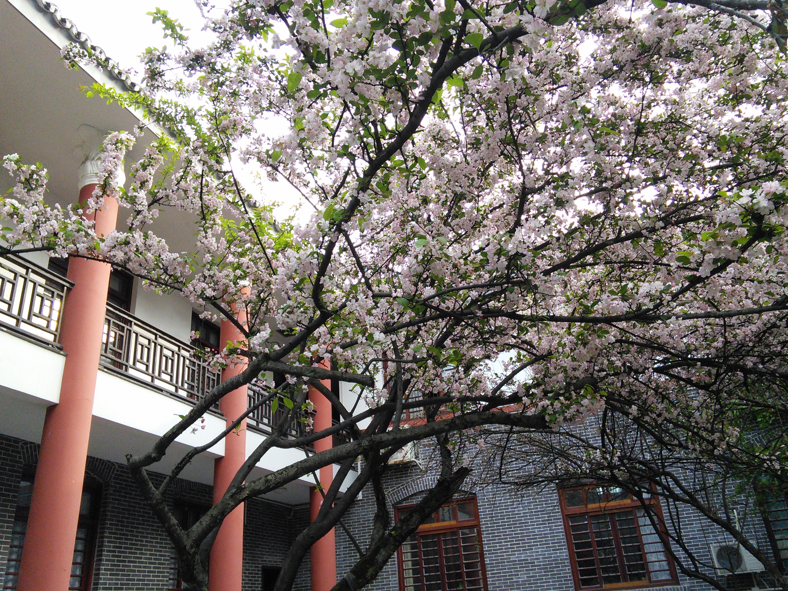 雅安キャンパス第一管理棟